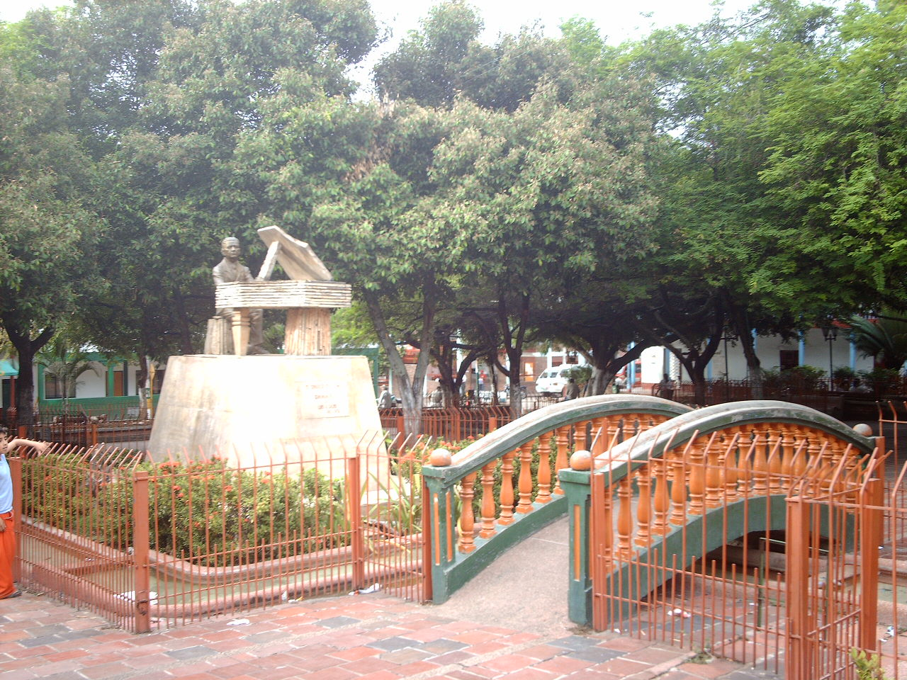 Parque Central, monumento a Luis A. Calvo en Agua de Dios